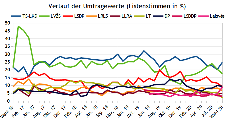 Umfragen zur Parlamentswahl in Litauen 2020